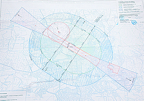 Зона полетов Аэродрома "Борисоглебское" с т.н. Зоной "Аварийной посадки"